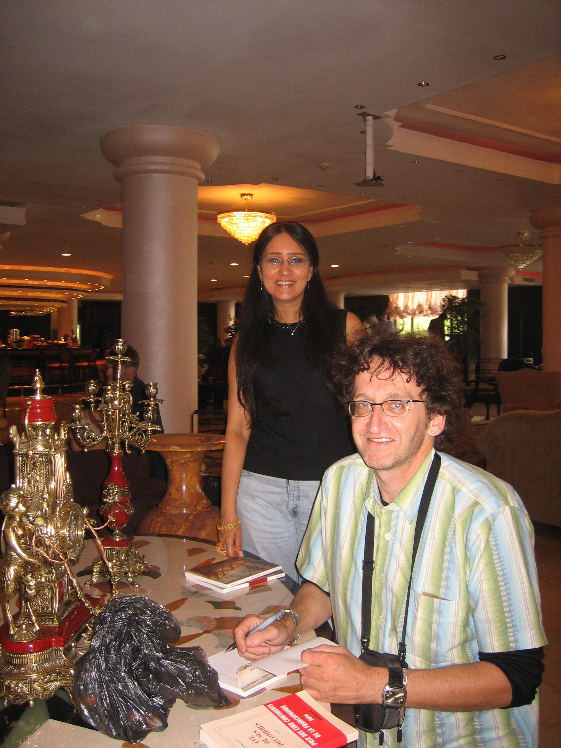 Séance de signature à Bucarest en 2006 lors de la réception de la Mention spéciale de l'Organisation internationale de la francophonie (en compagnie d'Ananda Devi)